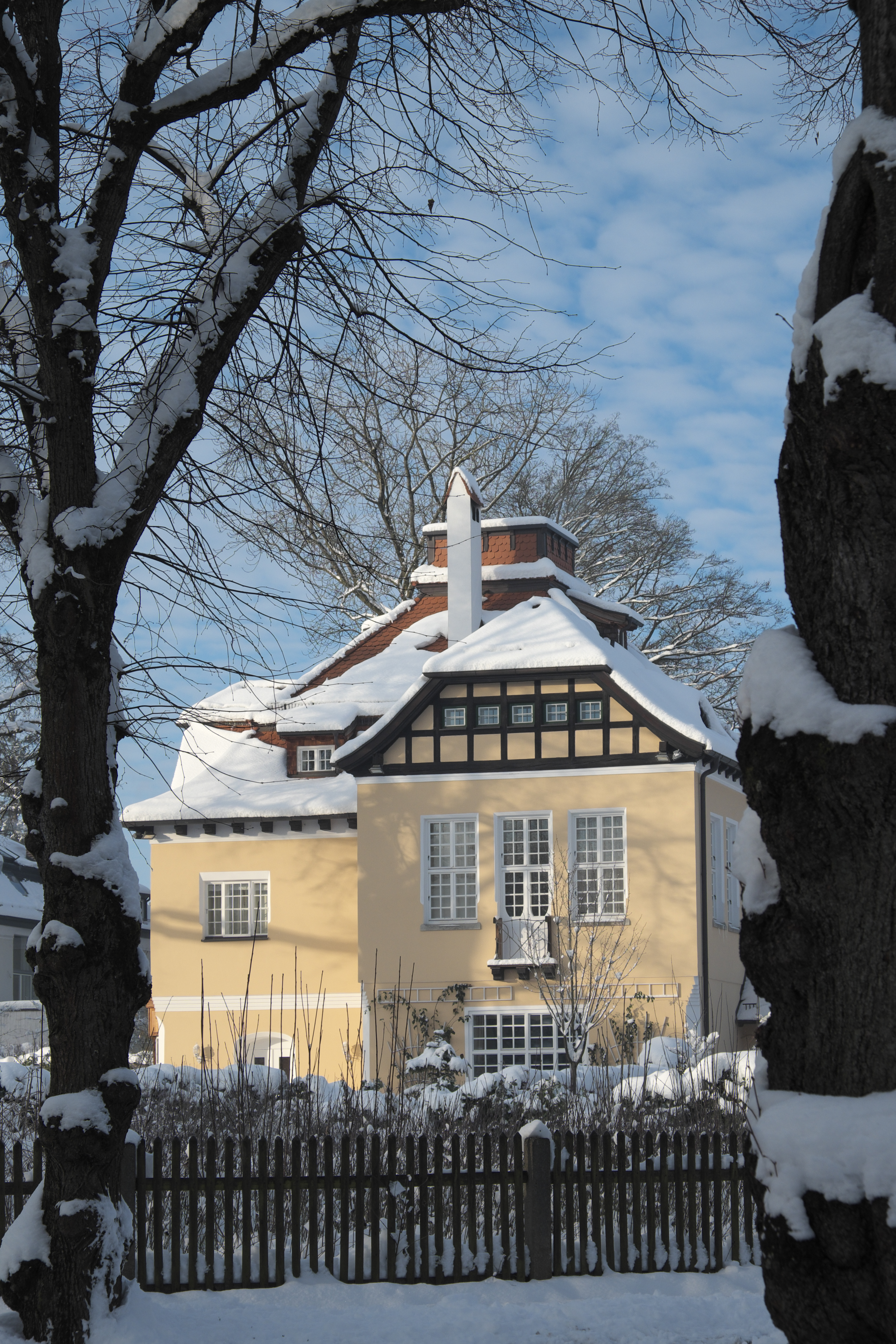 Villa in der Lützowstraße 11 in Pasing im Stadtbezirk Pasing-Obermenzing in München (Bayern/Deutschland), 1896 von Richard Riemerschmid erbaut